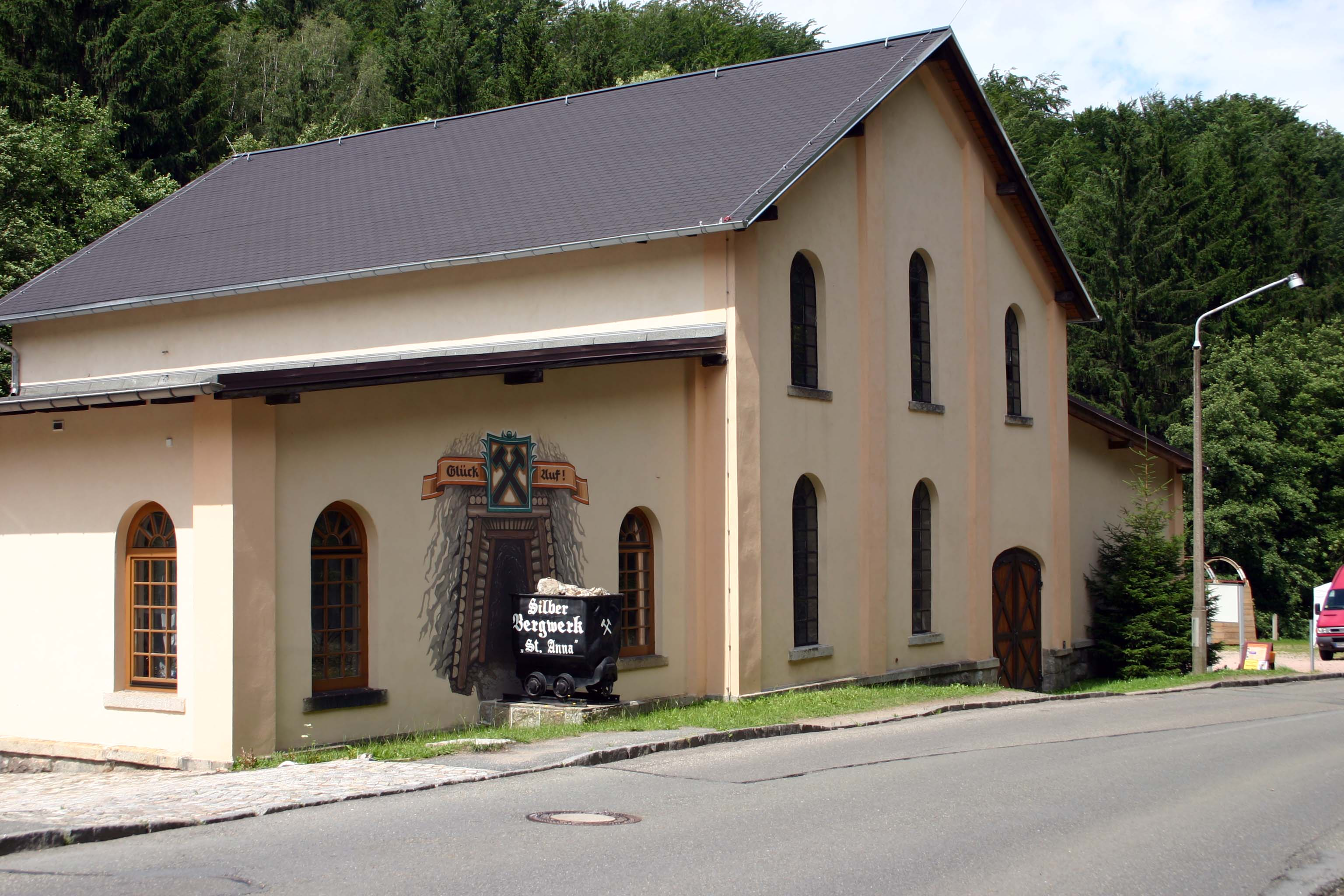 Straßenansicht des alten zschorlauer Gaswerkes aus Richtung Zschorlau, heute Sitz des Vereins, Kaue des Schaubergwerks